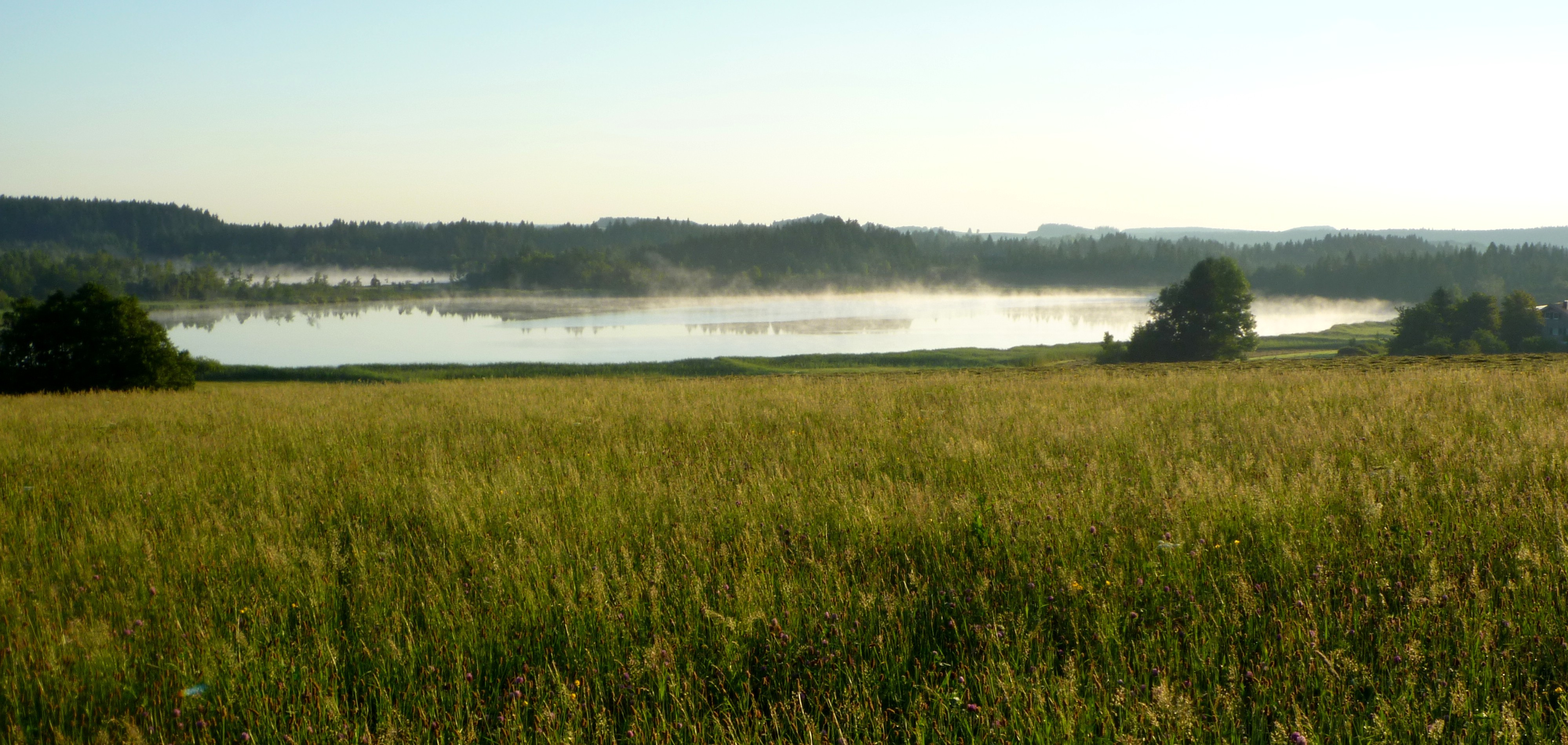 Isny - Großer und kleiner Ursee im Taufachmoos